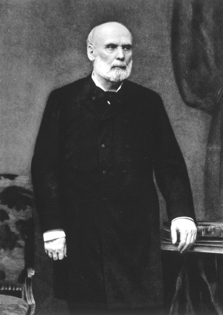 Jules Grévy d'après portrait officiel par Pierre Petit